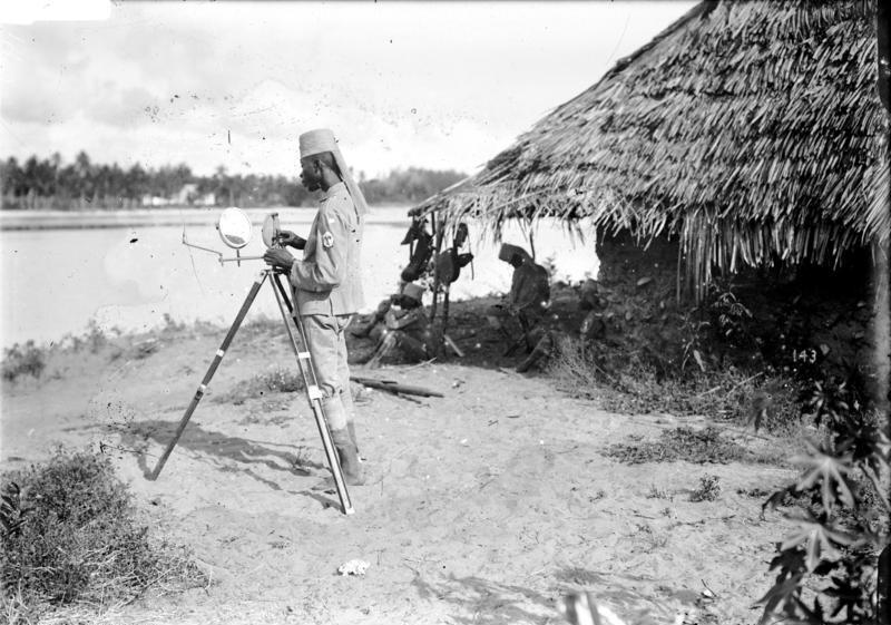 Signalübung am Heliographen